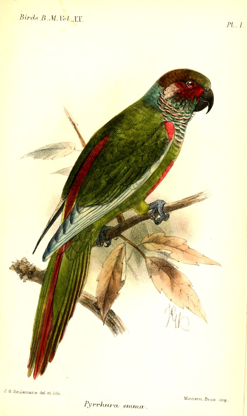 Pyrrhura emma = Pyrrhura picta, Painted Parakeet